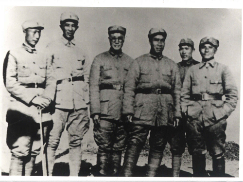 1940年3月，在晋东南桐峪129师师部合影。左起：聂荣臻、罗瑞卿、刘伯承、朱德、蔡树藩、邓小平Von links: Nie , Lo Jui-ching , Liu Bocheng , Zhu De , Cai Shufan , Deng Xiaoping